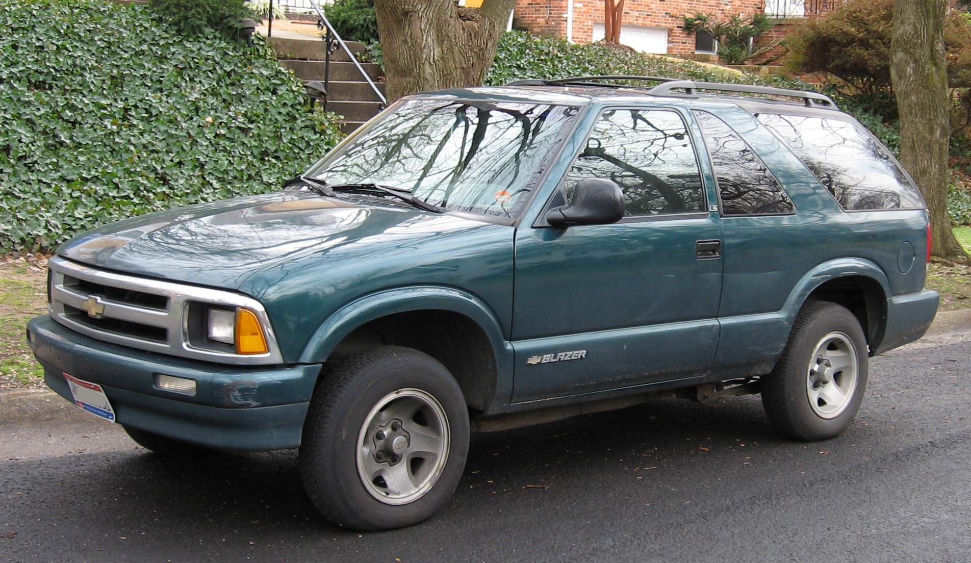 1995-1997 Chevrolet S-10 Blazer 2-doorphotographed in USA.